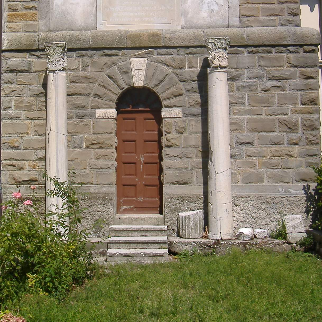 Santuario di Barbana: le colonne della chiesa antica, conservate alla base del campanile. Grado (Go), Italia.